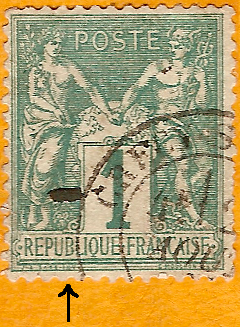 Timbre de France, type Sage (type 1) 1 c vert de 1876 ; la flèche indique le N de la signature sous le B de république.